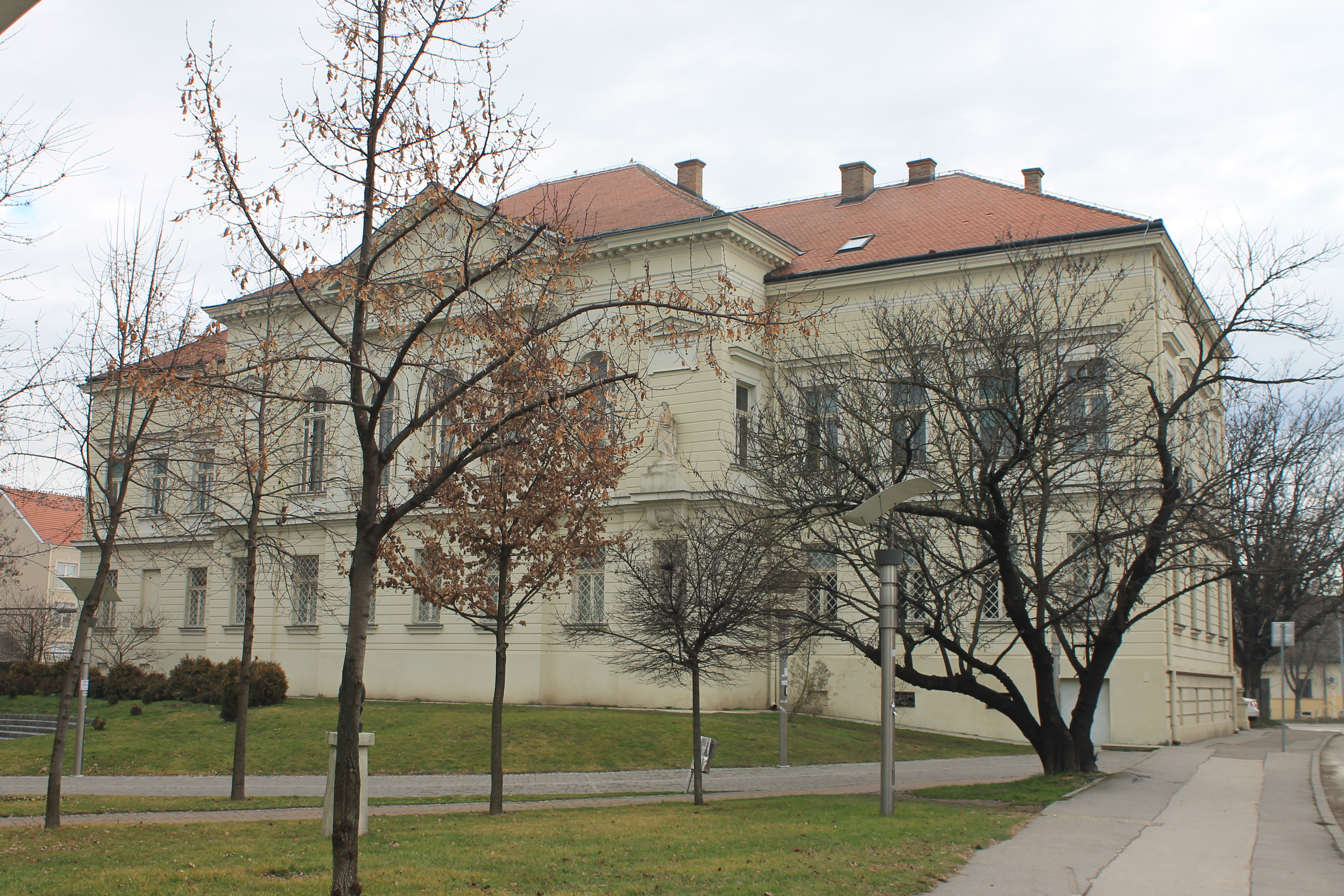 Muzej Srema, Sremska Mitrovica